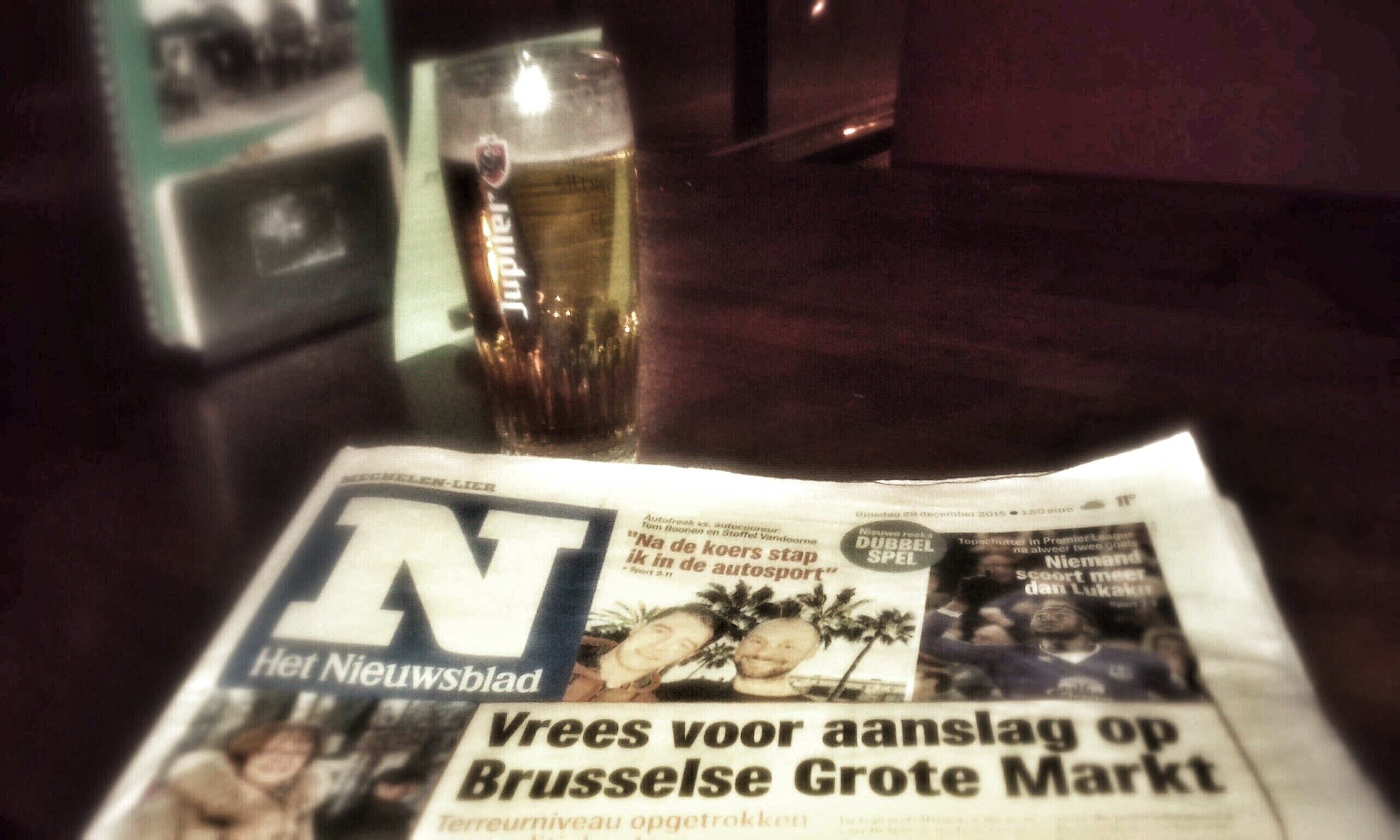 Het Nieuwsblad bij een pint bier